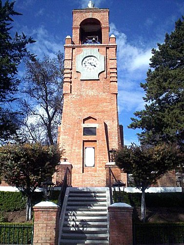 Foto Reloj Centro Acambay